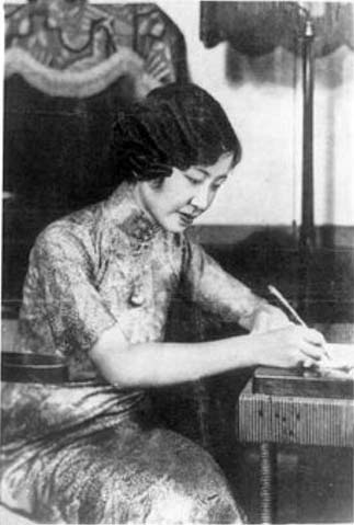 金韫颖（1913年－1992年）